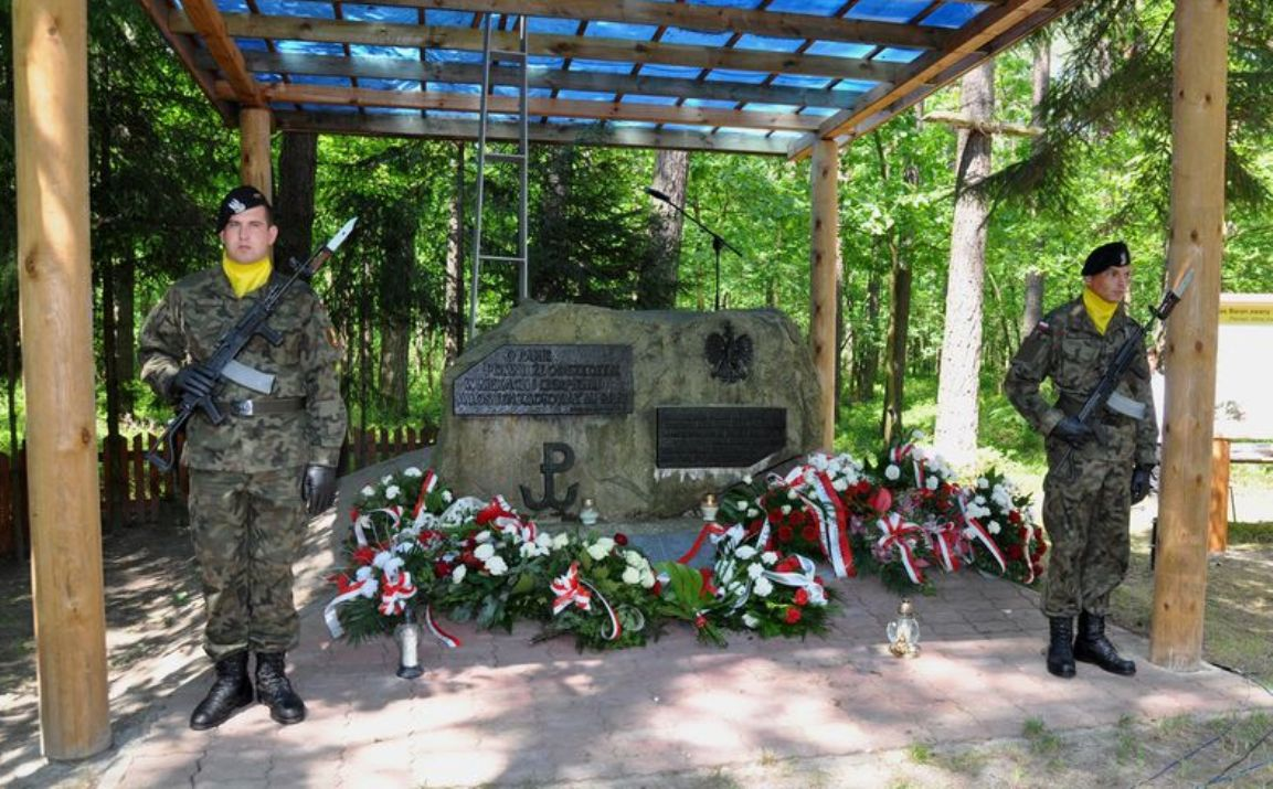 Kąkolewnica - miejsce martyrologii żołnierzy AK, WiN i BCh w uroczysku Baran. W tym rejonie szkolił się ChPSzR nr 12 (grudzień 1944/styczeń 1945)